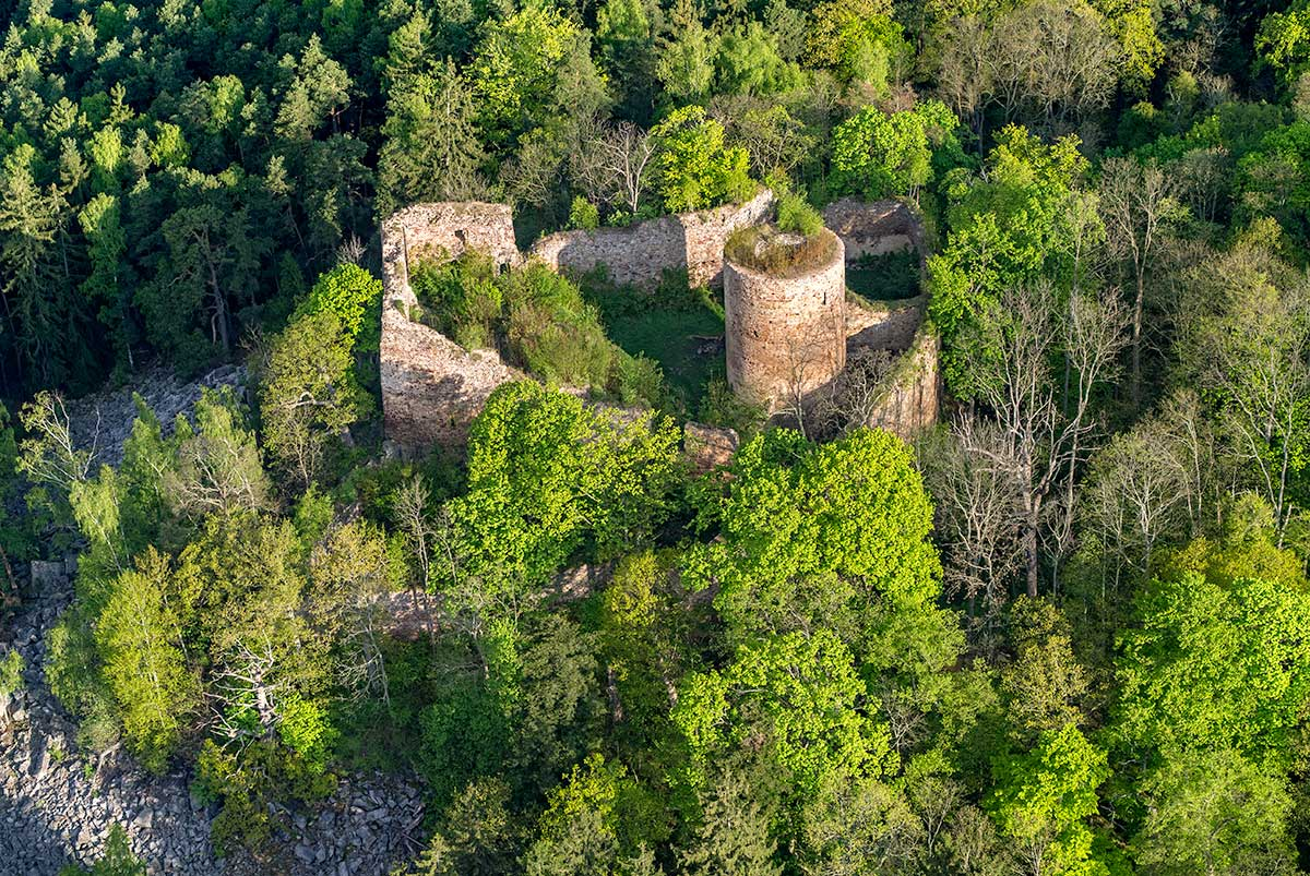 Hrad Valdek, vojenský újezd Brdy, býv. Hrachoviště, Hrachoviště (Brdy).